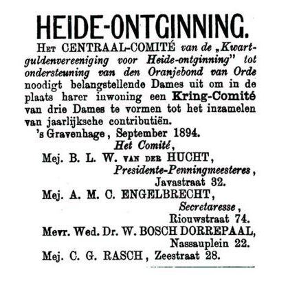 Advertentie van de Kwartguldenvereniging in de Leeuwarder Courant d.d. 18-09-1894